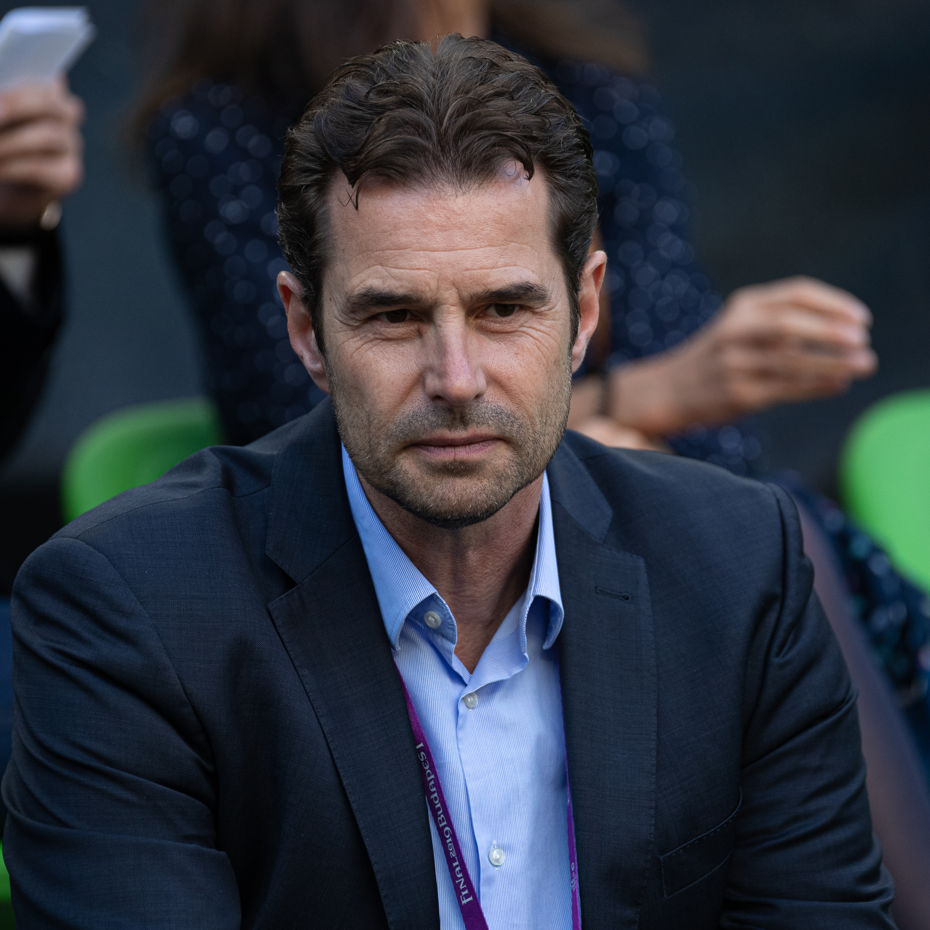 Fußball, Frauen, UEFA Women's Champions League, Olympique Lyonnais - FC Barcelona; Ralf Kellermann, sportlicher Leiter des VfL Wolfsburg, auf der Zuschauertribüne; Porträt, Einzelbild